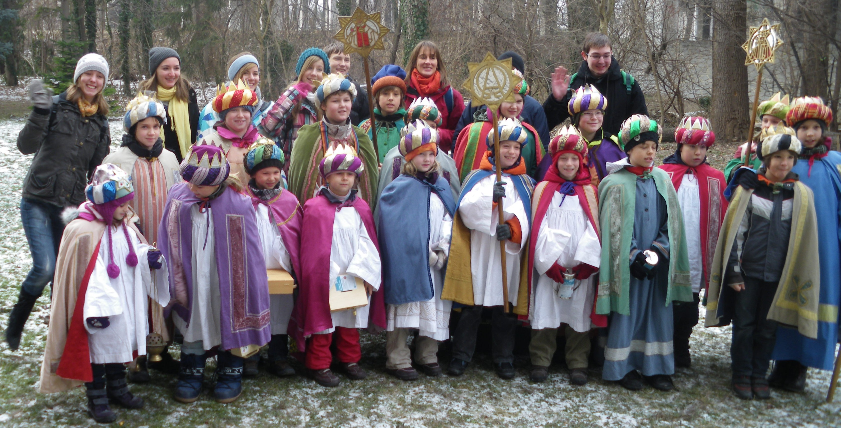 19 Sternsinger der Katholischen Jungschar der Pfarre St. Nikolaus mit Begleitpersonen, die mit 6 Gruppen 2011 ganz Inzersdorf besucht hatten